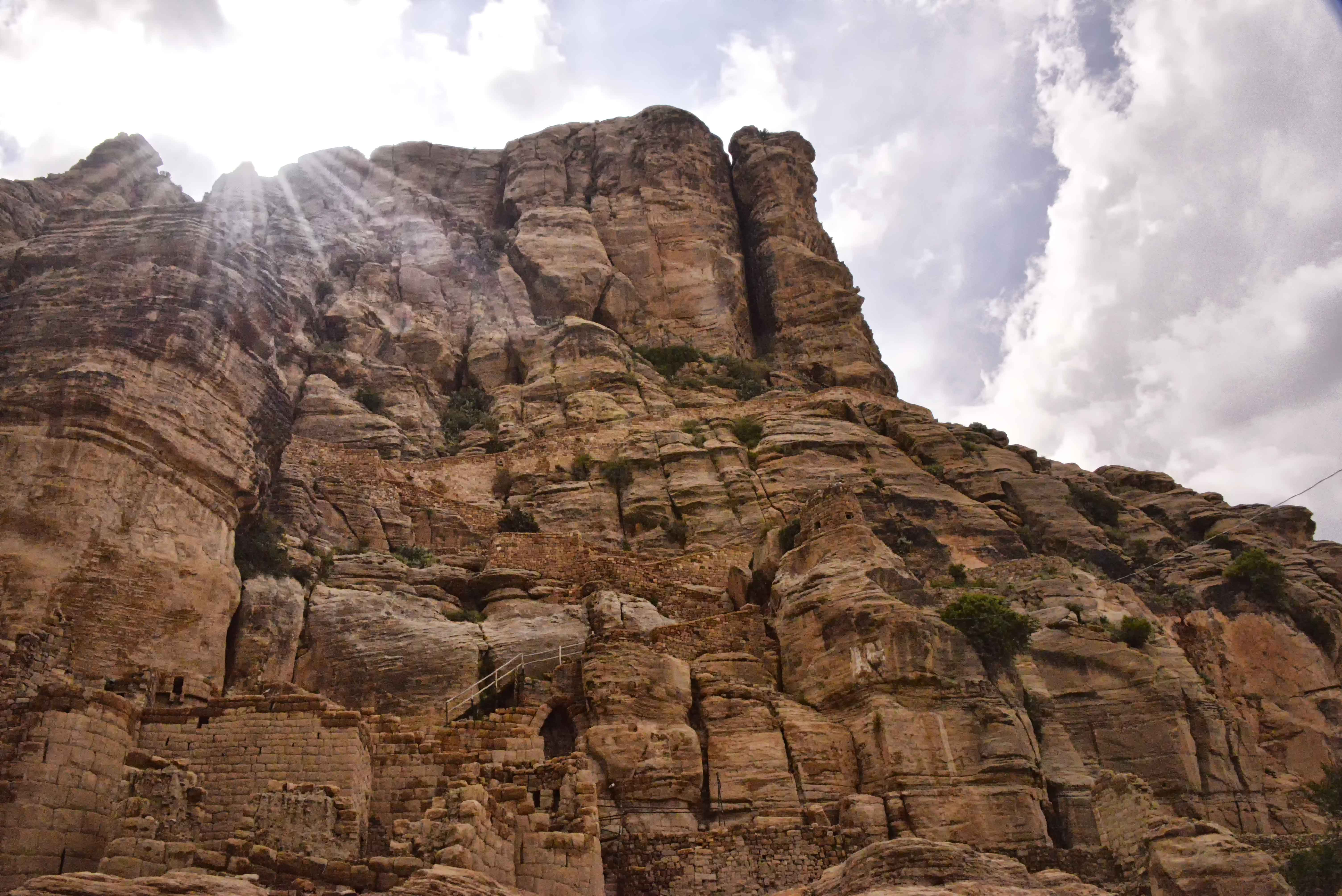 Yemen